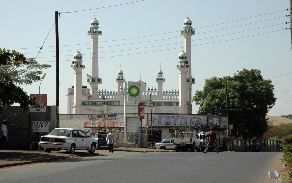 Mosque in Moshi, Tanzania